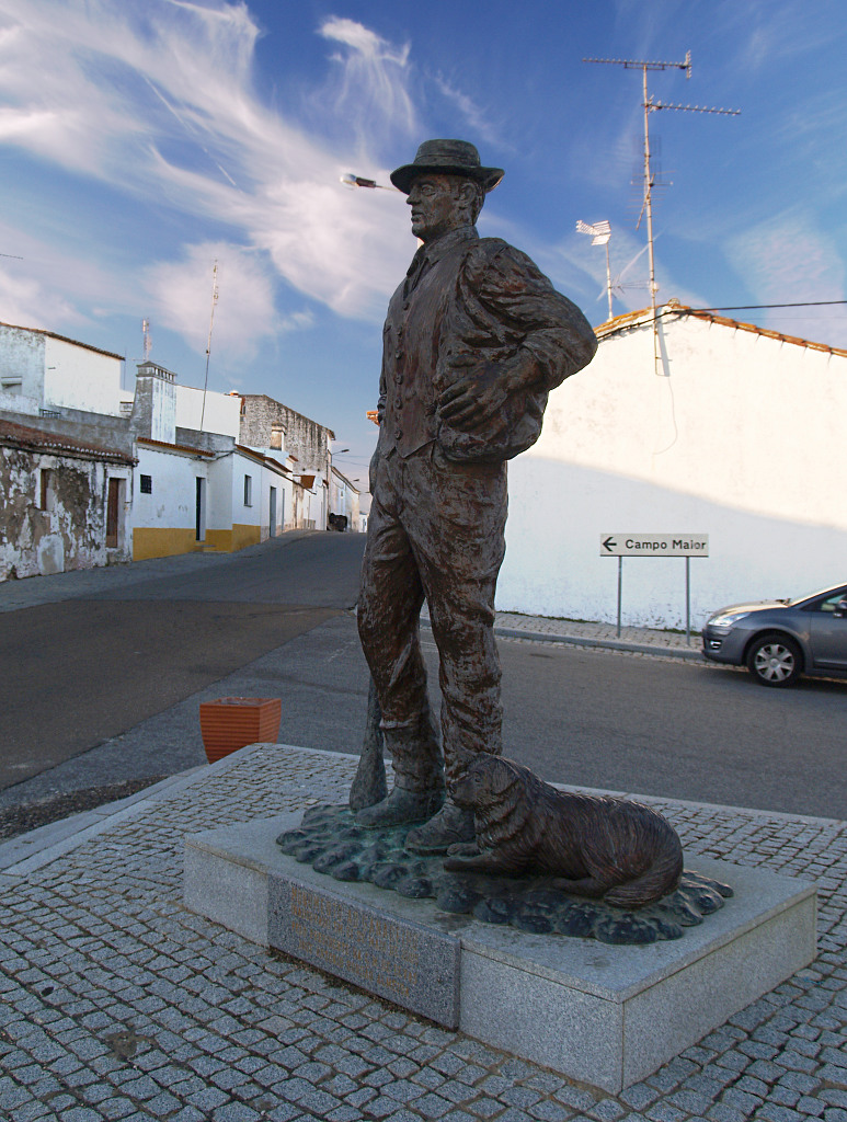 Estátua do vaqueiro em Santa Eulália, Elvas